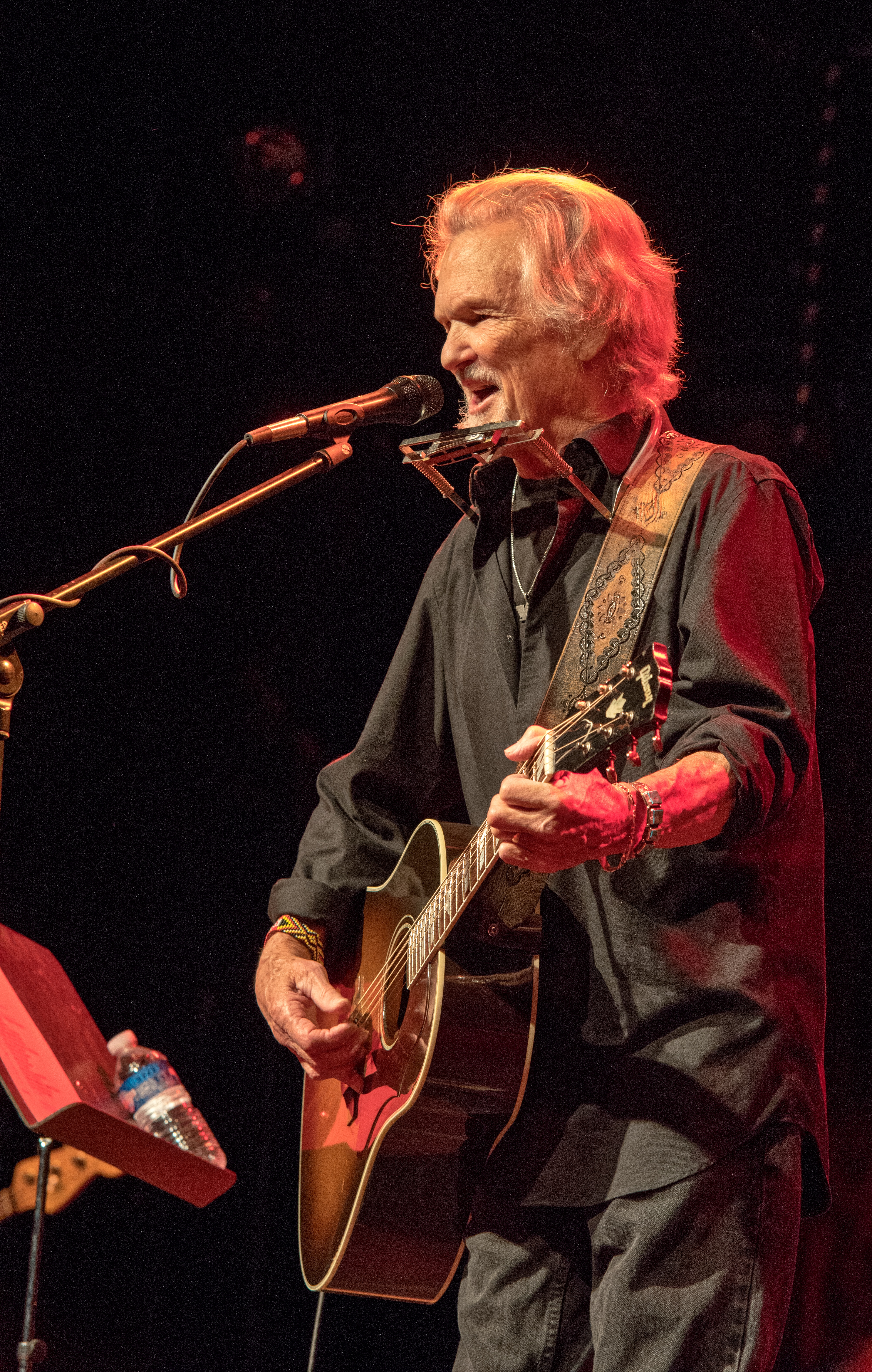 Bilder vom Zelt Musik Festival 2017 in Freiburg im Breisgau Kris Kristofferson